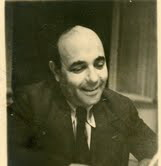 Private Fotografie aus dem Nachlass vom Sohn des fotografierten Dichters Moshe Lifshits (1894-1940)